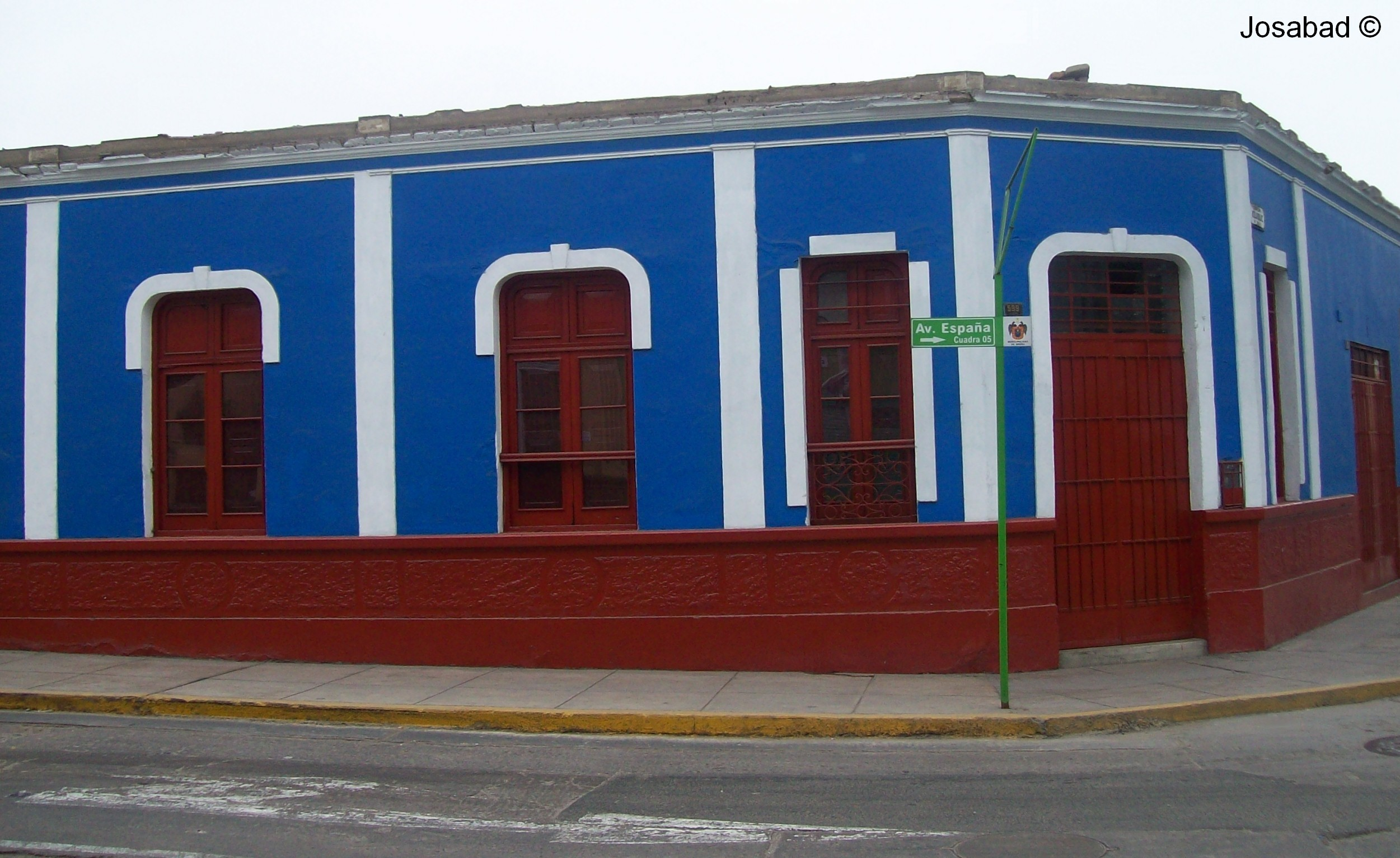 Vista de una casa en la quinta cuadra de la Avenida España.